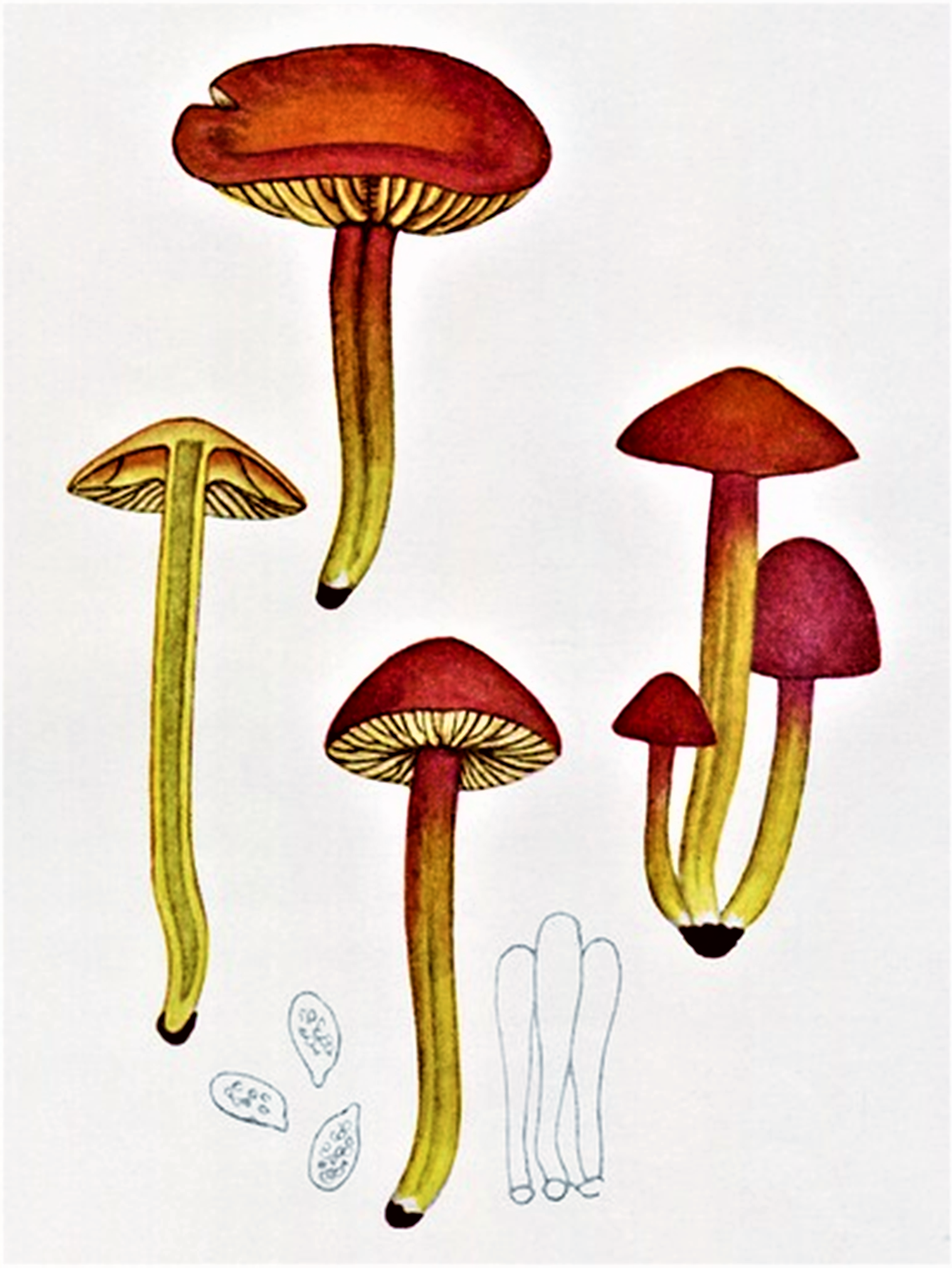 Giacomo Bresadola: Hygrophorus coccineus Schaeff., 1774) Fr. (1838), heute Hygrocybe coccinea (Schaeff.) P.Kumm. (1871)